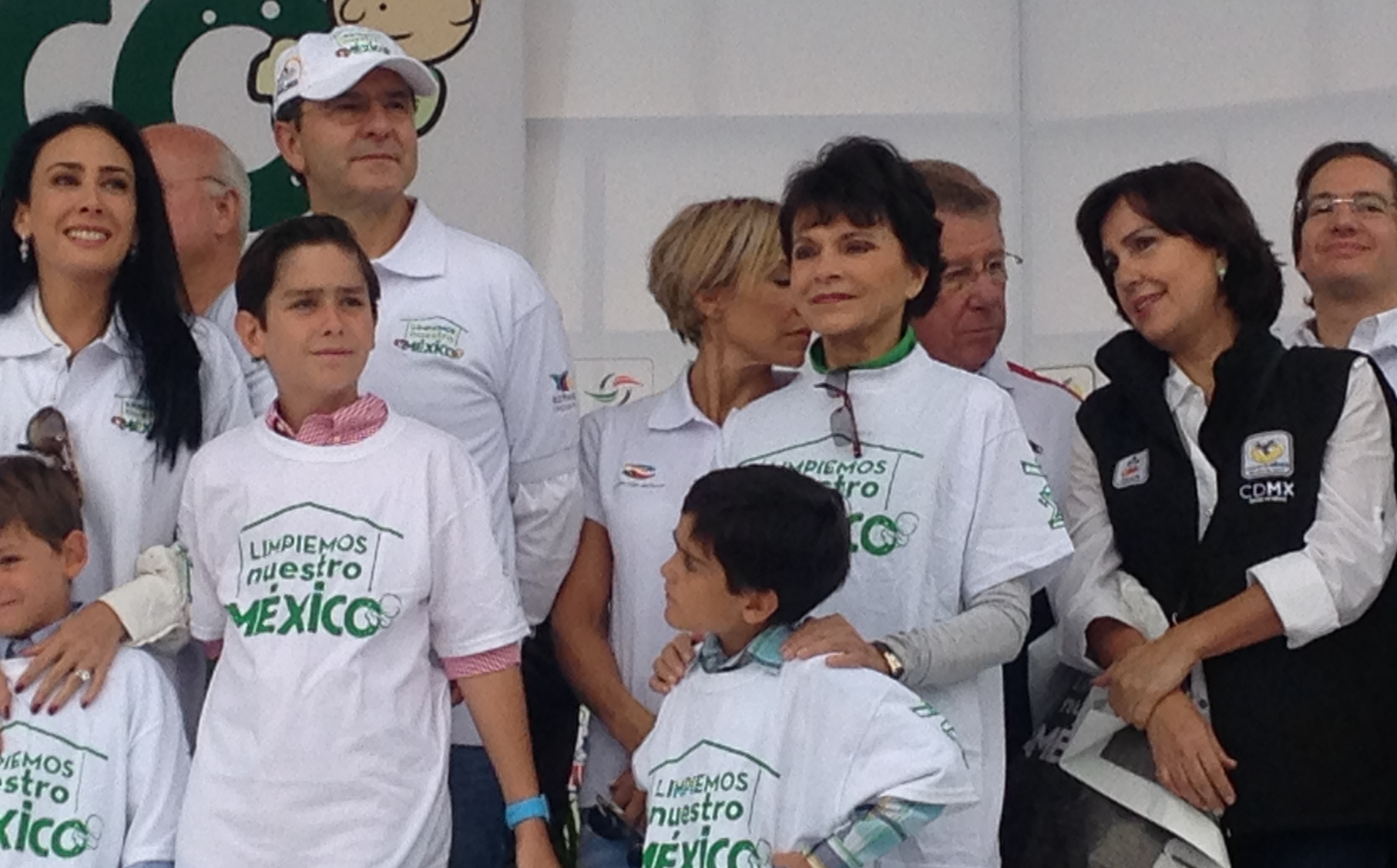 Pati Chapoy en el evento Vamos México